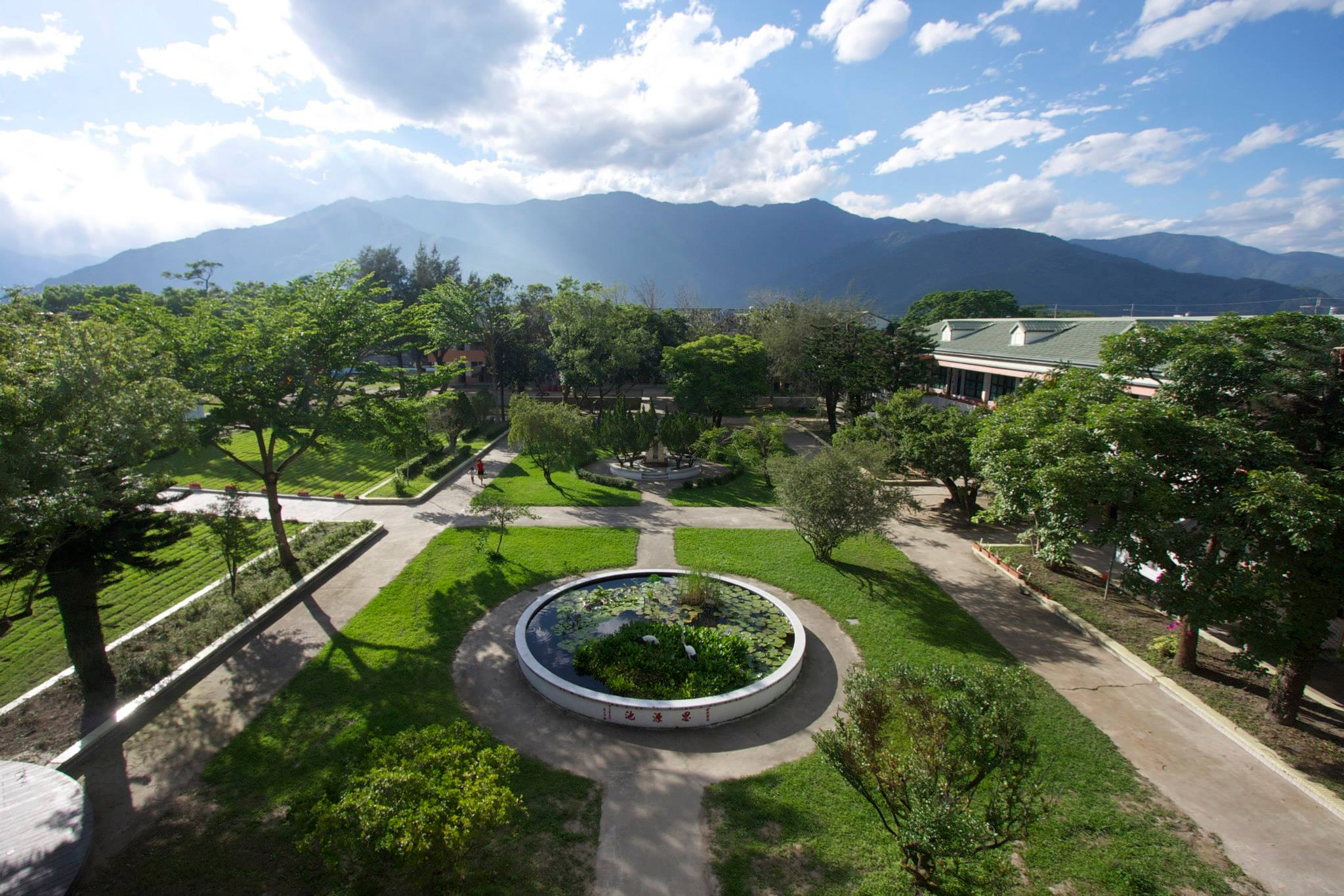 中文（台灣）: 福原國小中庭